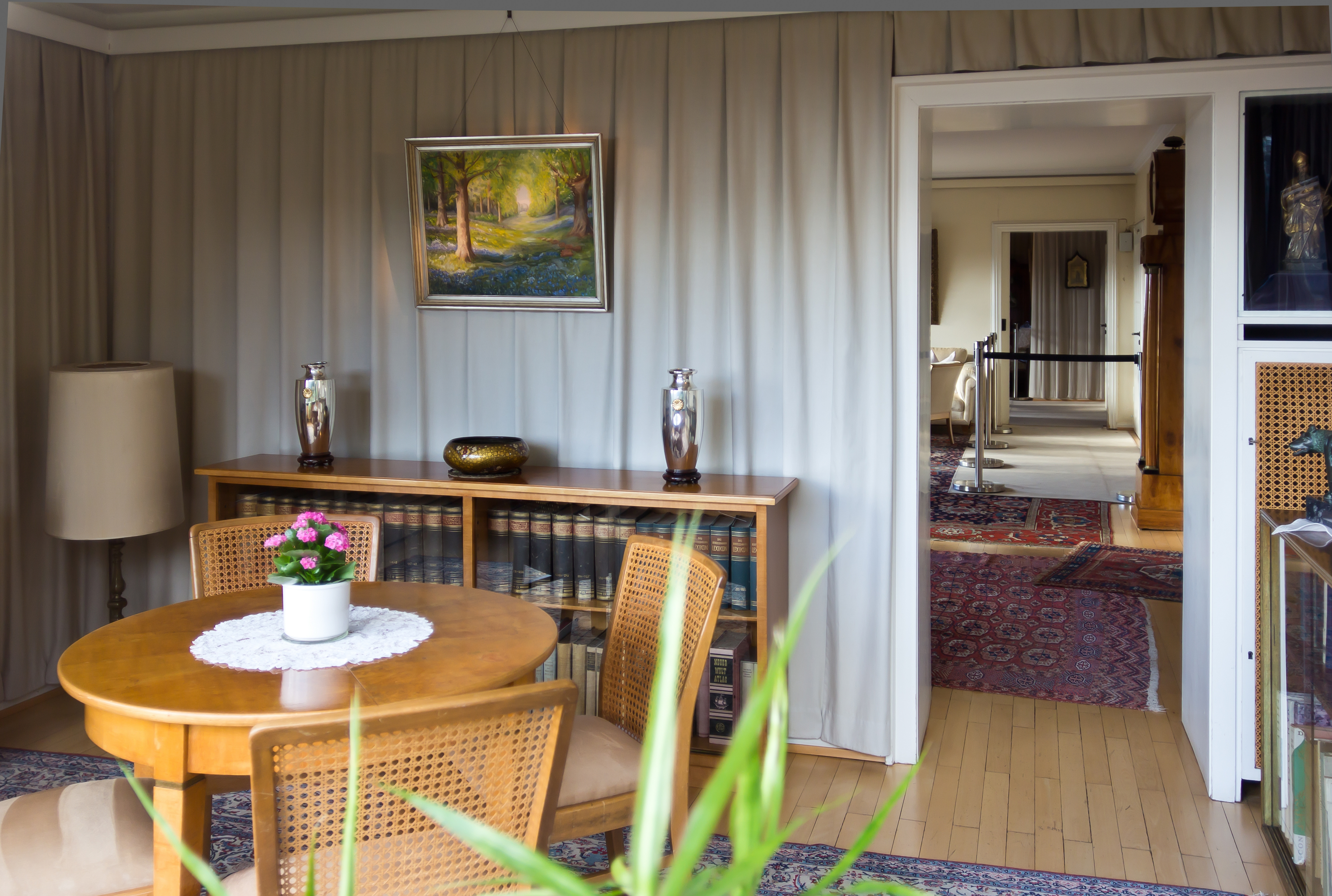 Bundeskanzler-Adenauer-Haus. Foto: Blick von außen in die „Kajüte“, eine nachträglich überdachte Terrasse.